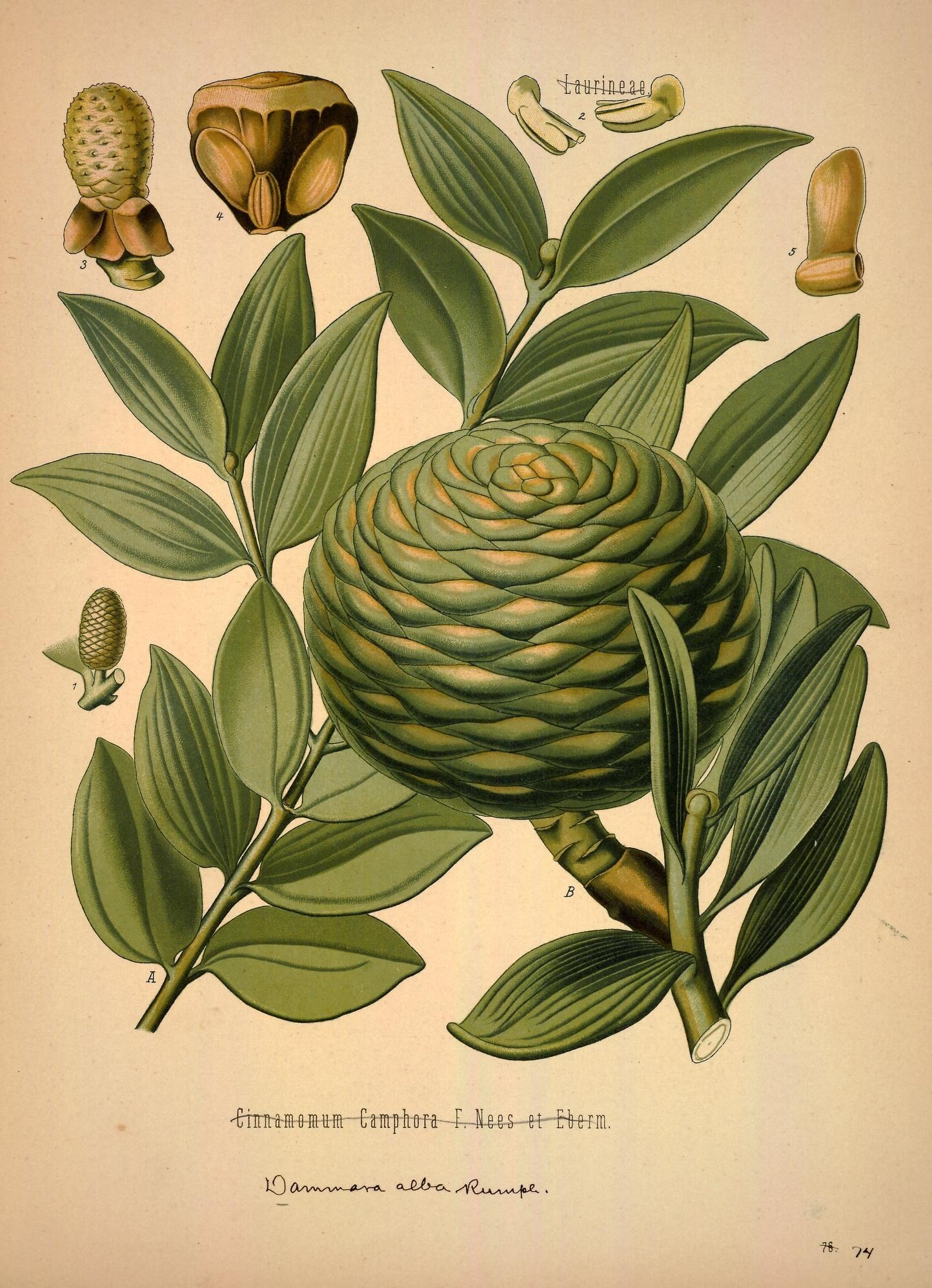 Dammarabaum. A Blattzweig und B Frucht in natürl. Grösse; 1 männliche Blüthenähre, desgl.; 2 Staubblätter, vergrössert; 3 Fruchtspindel, natürl. Grösse; 4 Deckschuppe mit Fruchtschuppe und Samen, desgl.; 5 Same mit Flügel, vergrössert.